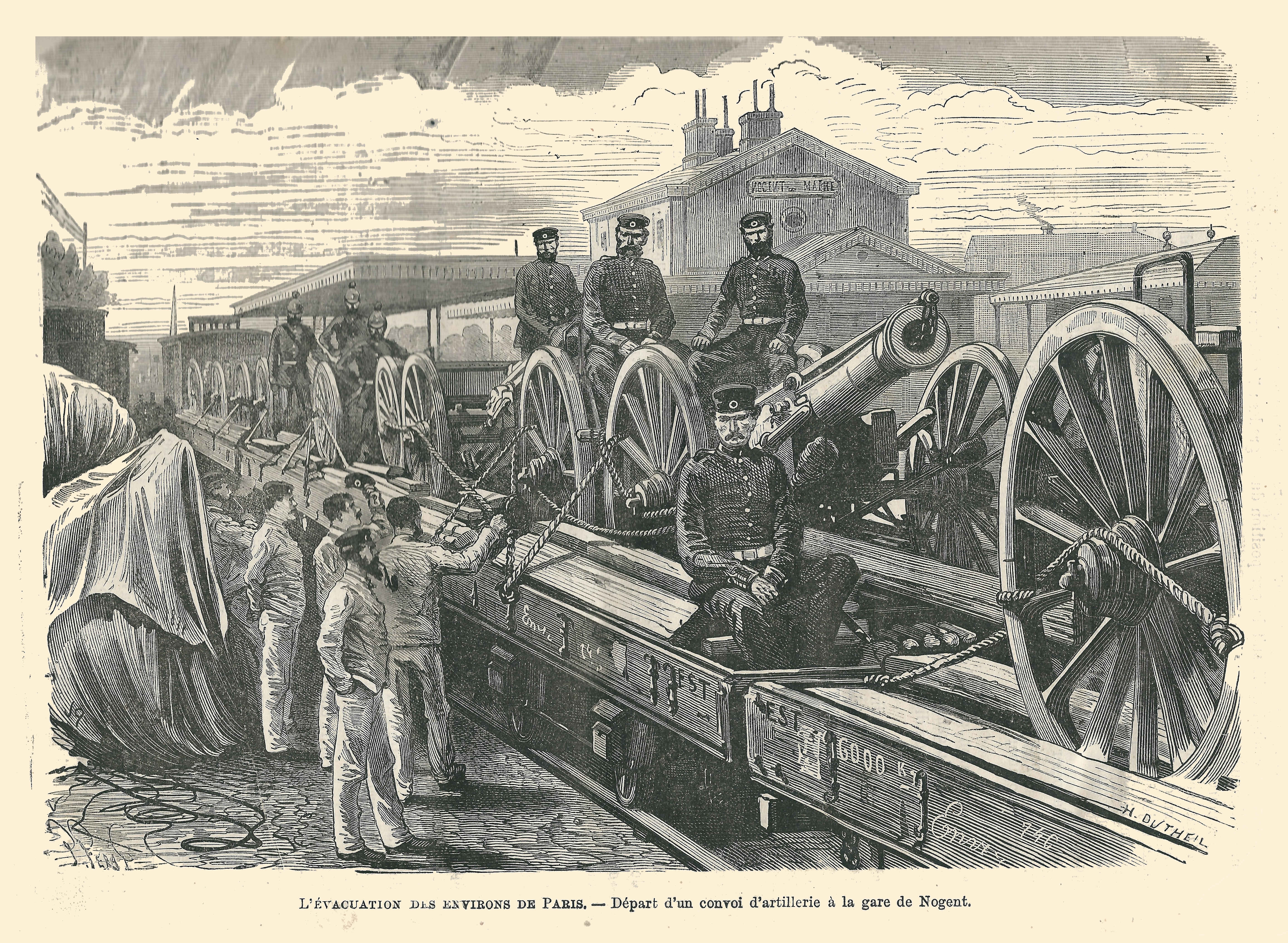 Nogent-sur-Marne (Seine-et-Oise , France) ; convoi d'artillerie en gare en cours d'évacuation en 1870-1871.